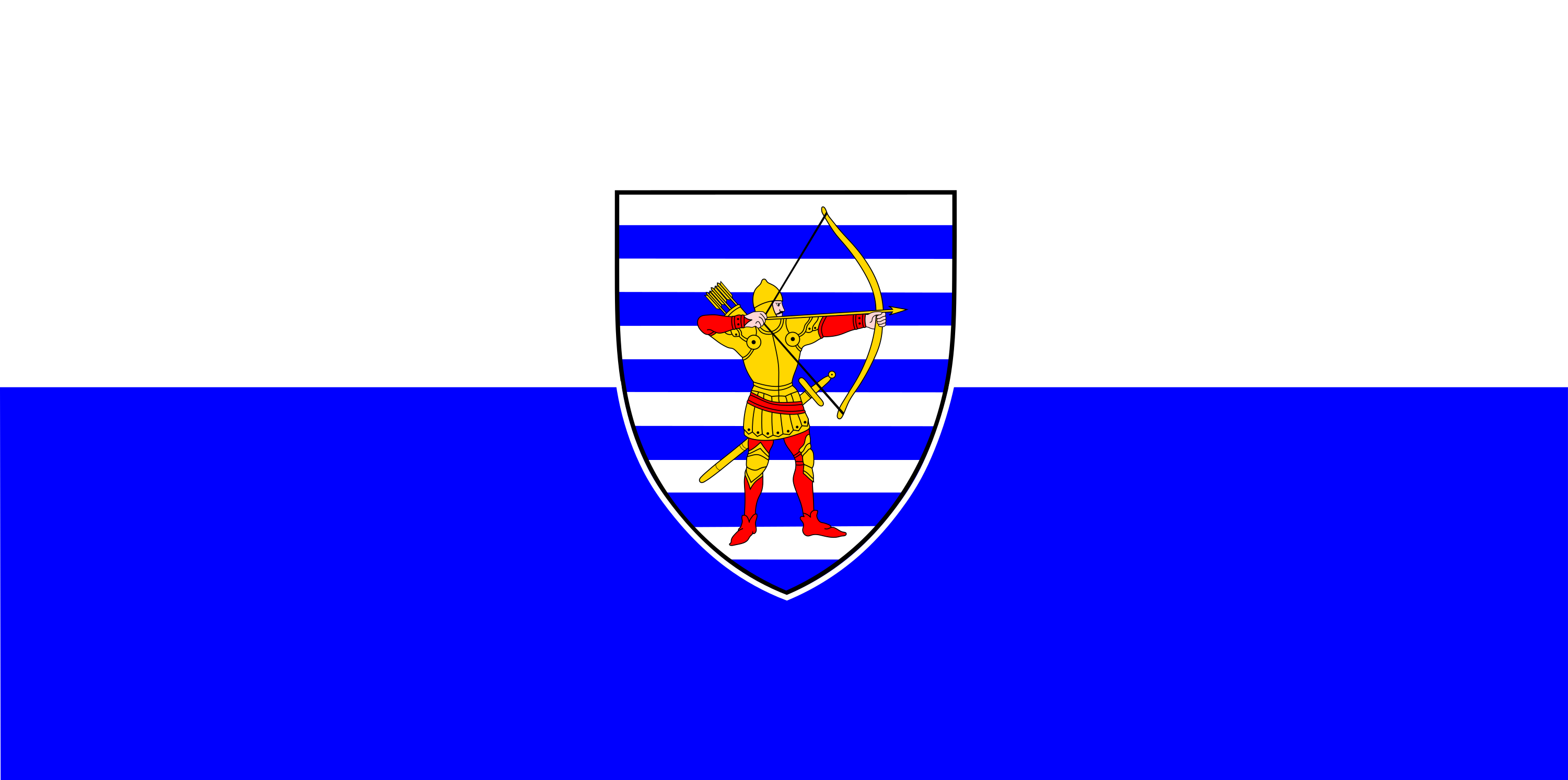 Flag of Bălţi, Moldova